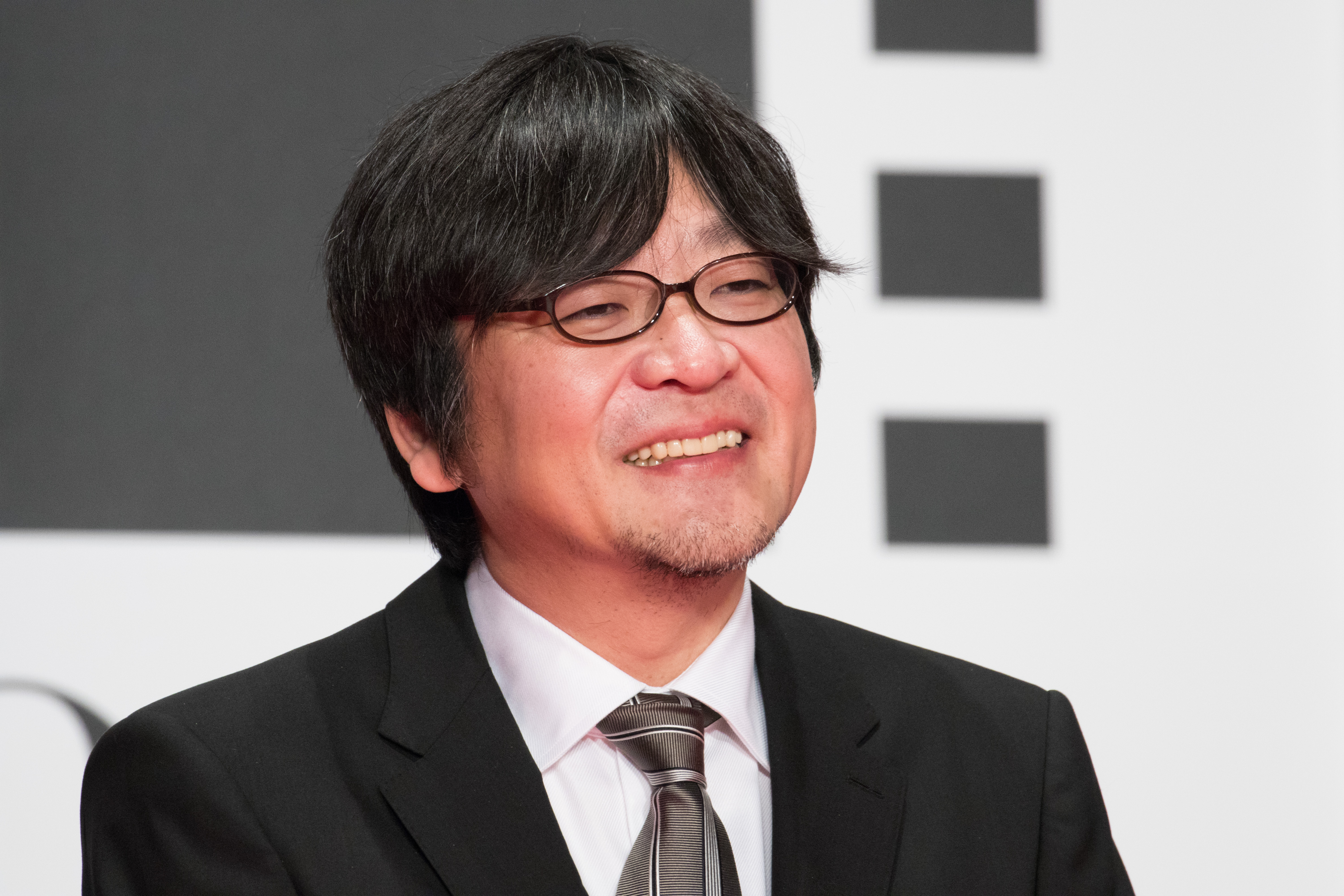 第29回 東京国際映画祭 オープニングセレモニー 細田守 (細田守の世界)